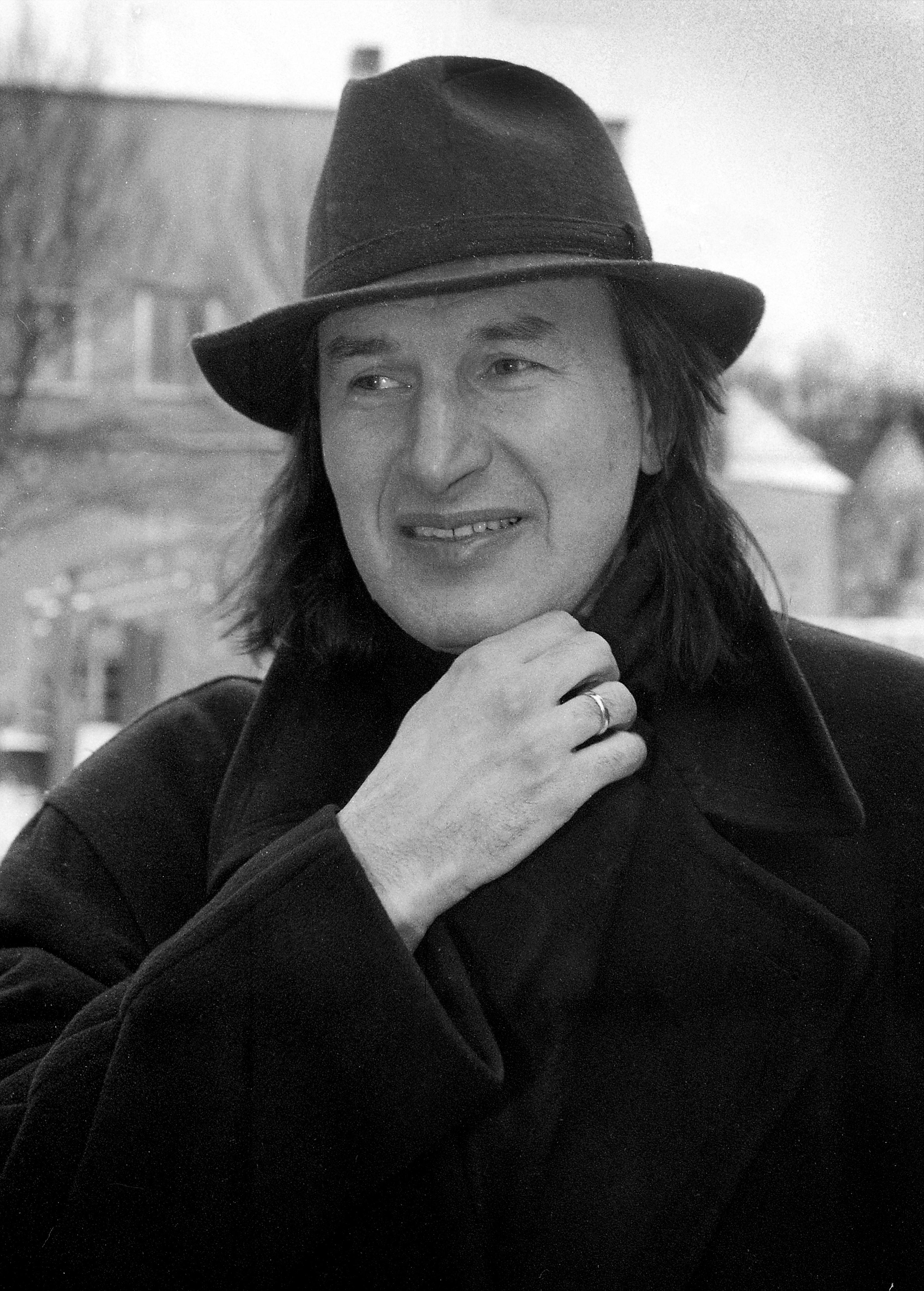 Tõnu Kaljuste 1993. aastal